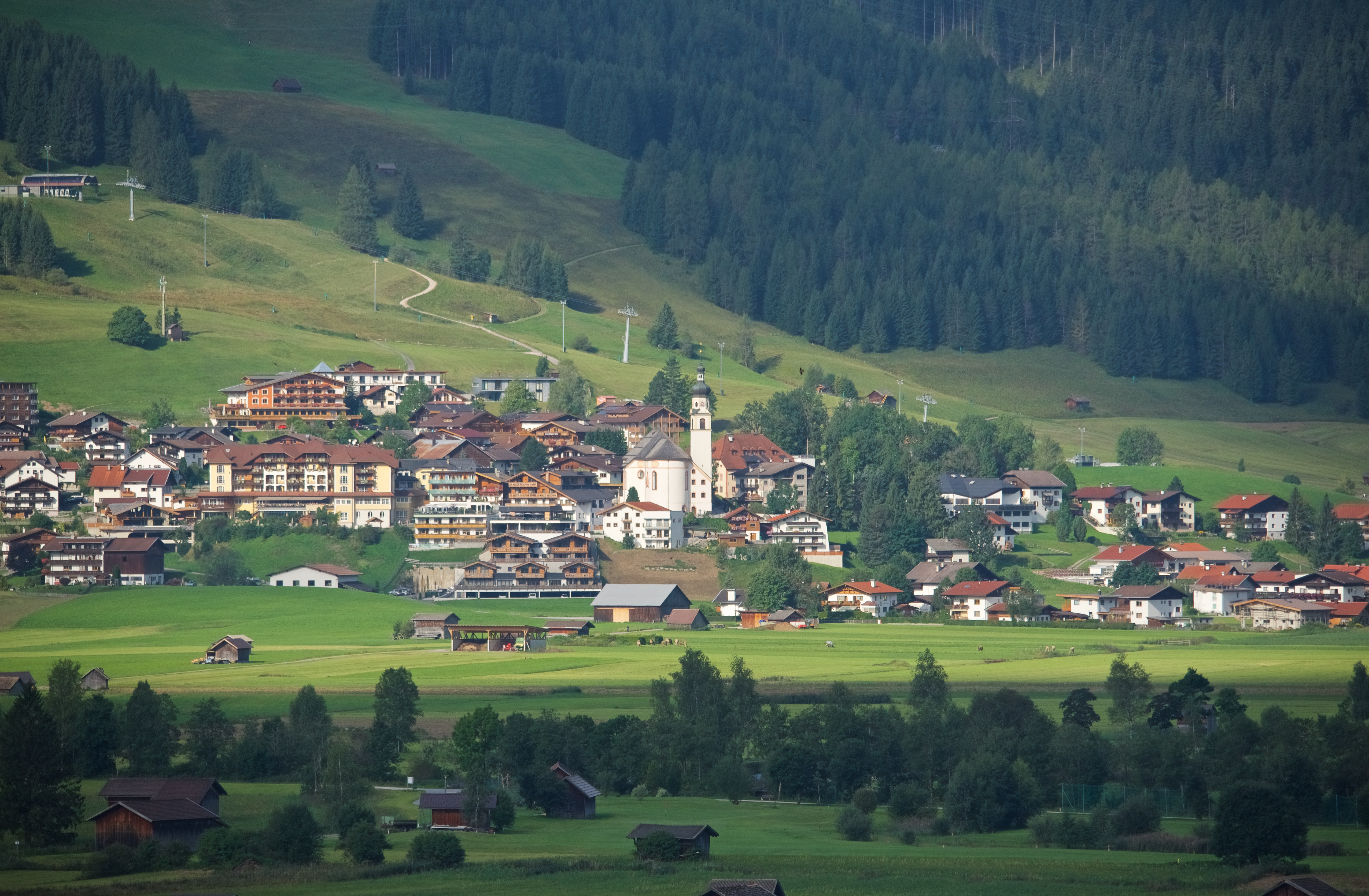 Lermoos, vom Stadtrand von Ehrwald aus gesehen